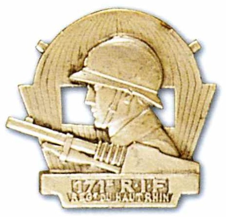 insigne régimentaire du 171e RIF